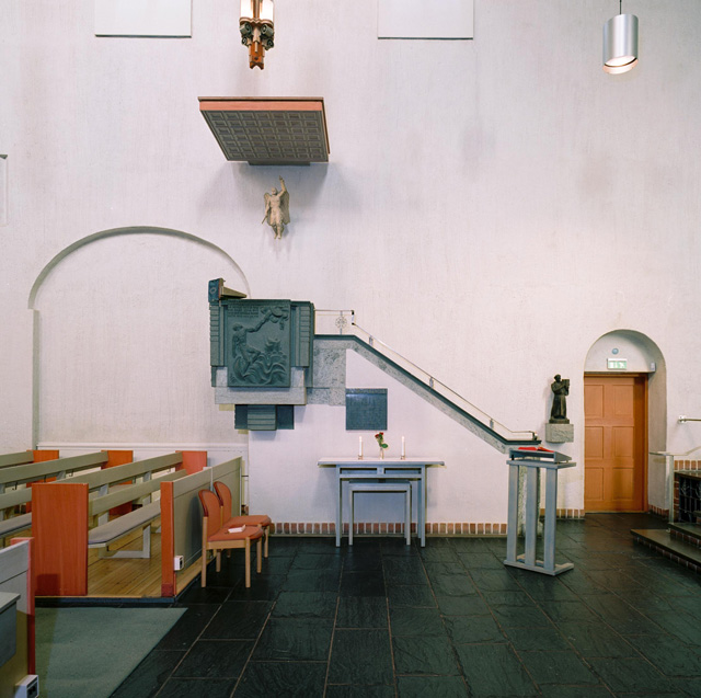 Västerledslyrkan, interiören med predikstolen. Dörr till tillbyggnaden och sakristian t h.